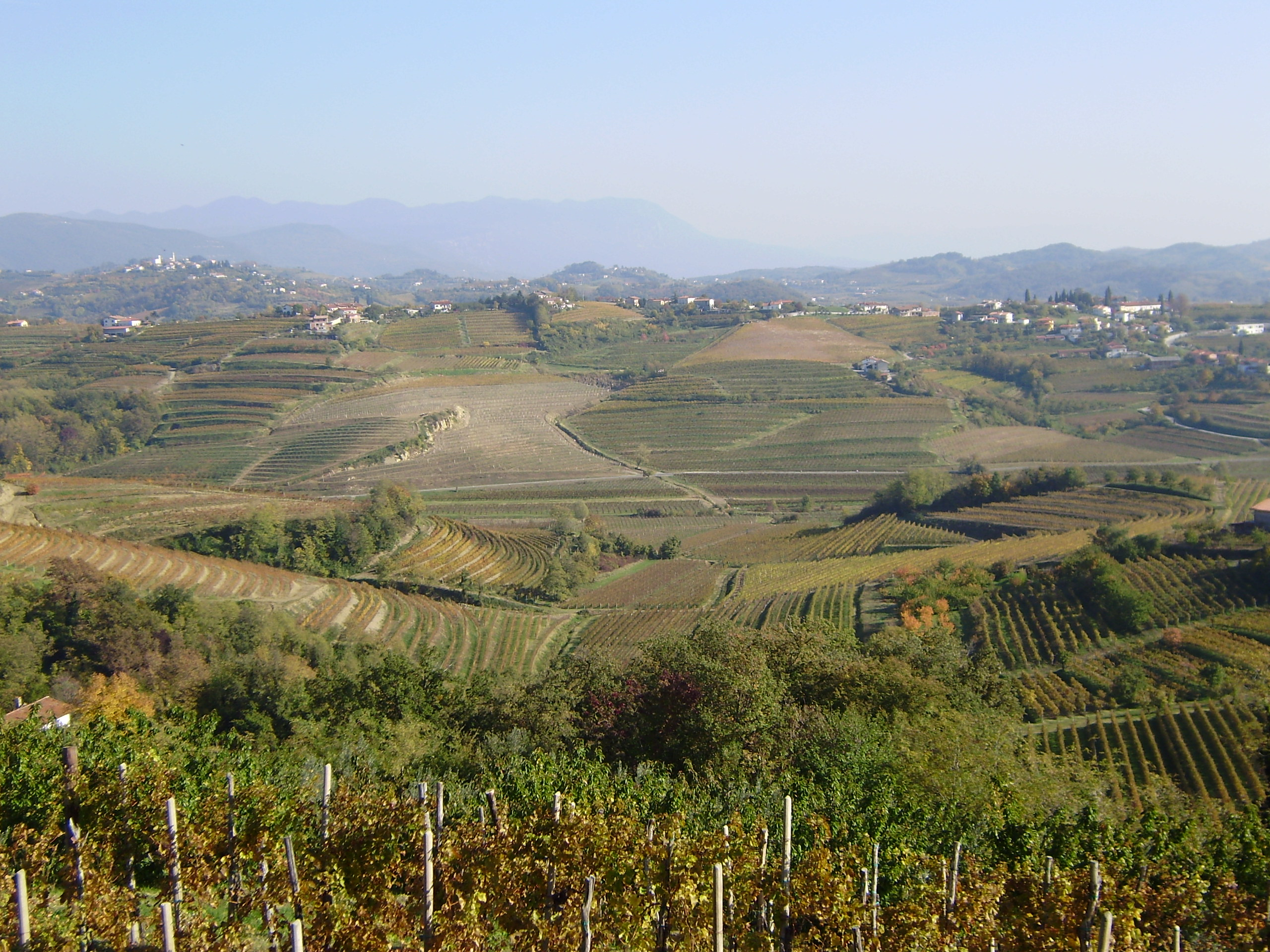 Goriška Brda Avtor: Vera Zupančič, Ljubljana Datum: nevember 2011